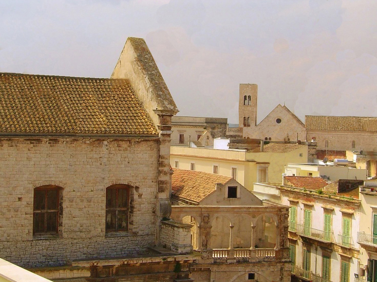 Il mio punto di vista su Bitonto